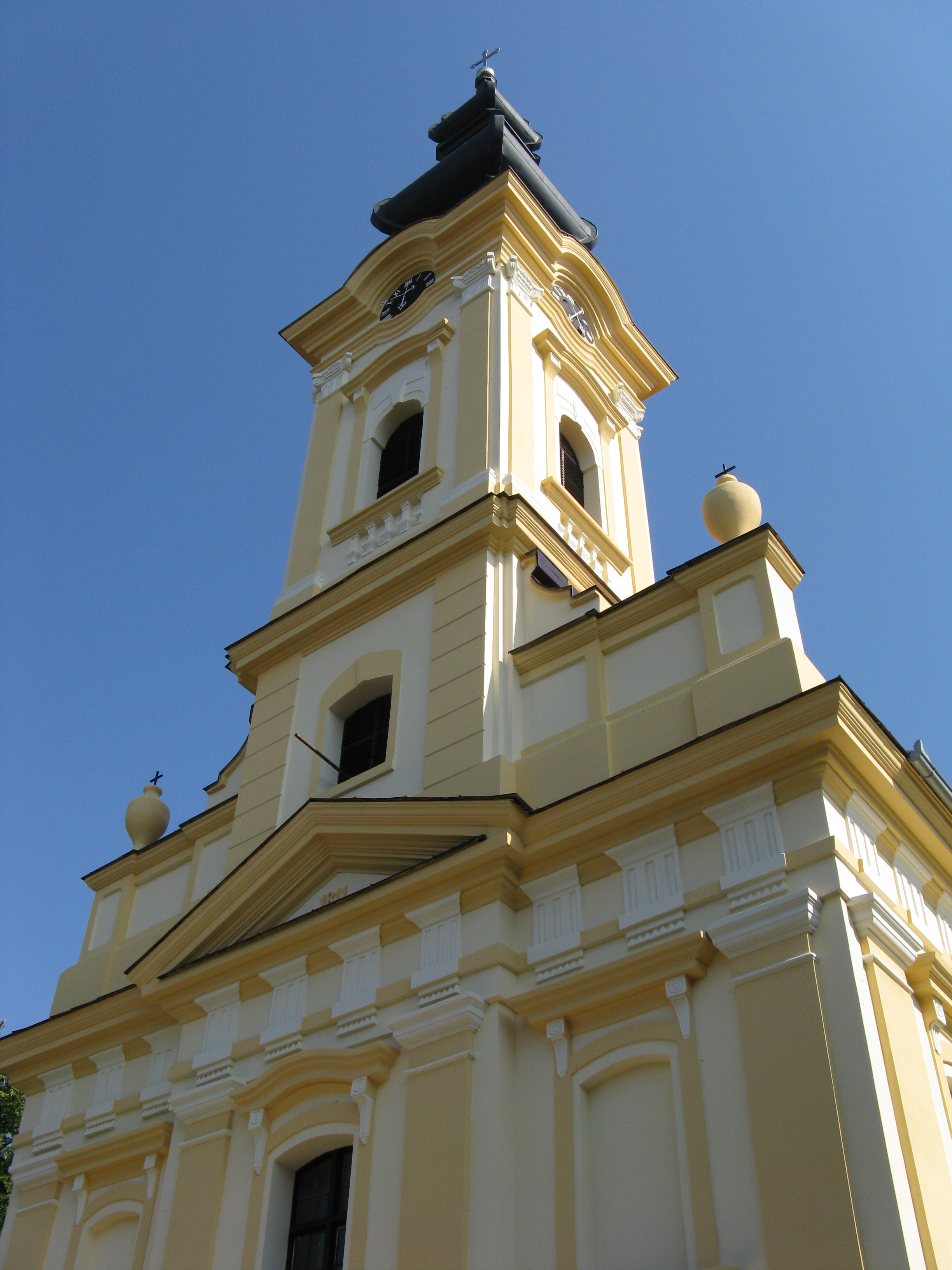 Црква је саграђена 1811. године у центру села Долово. То је барокна грађевина једнобродне издужене основе. Западним прочељем доминира високи звоник надвишен уском лименом капом. Иконостас који раздваја полукружни ослтарски простор од наоса осликао је 1850. године Јован Поповић.